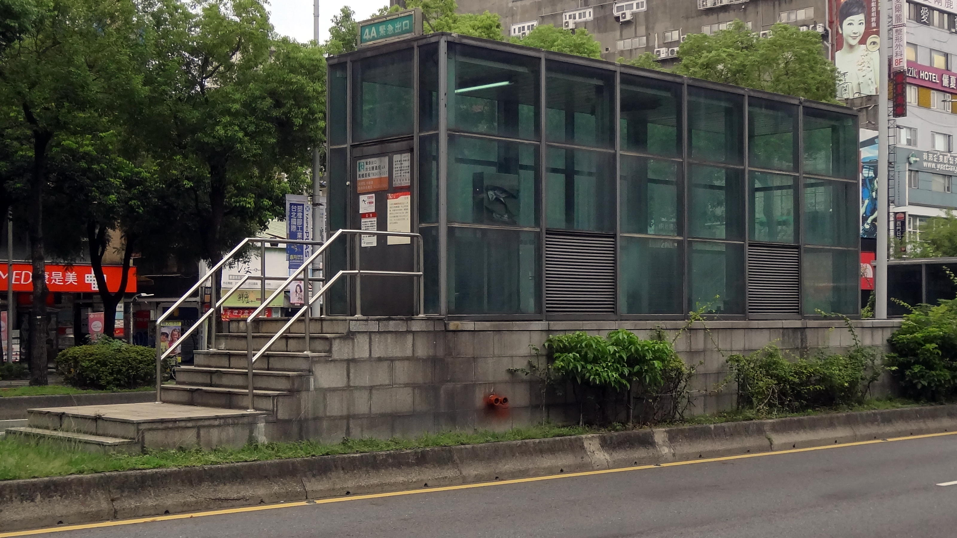 臺灣鐵路管理局西門緊急停靠站4A出口（武昌街緊急出口），現為臺灣鐵路管理局與臺灣高鐵共用之緊急出口。